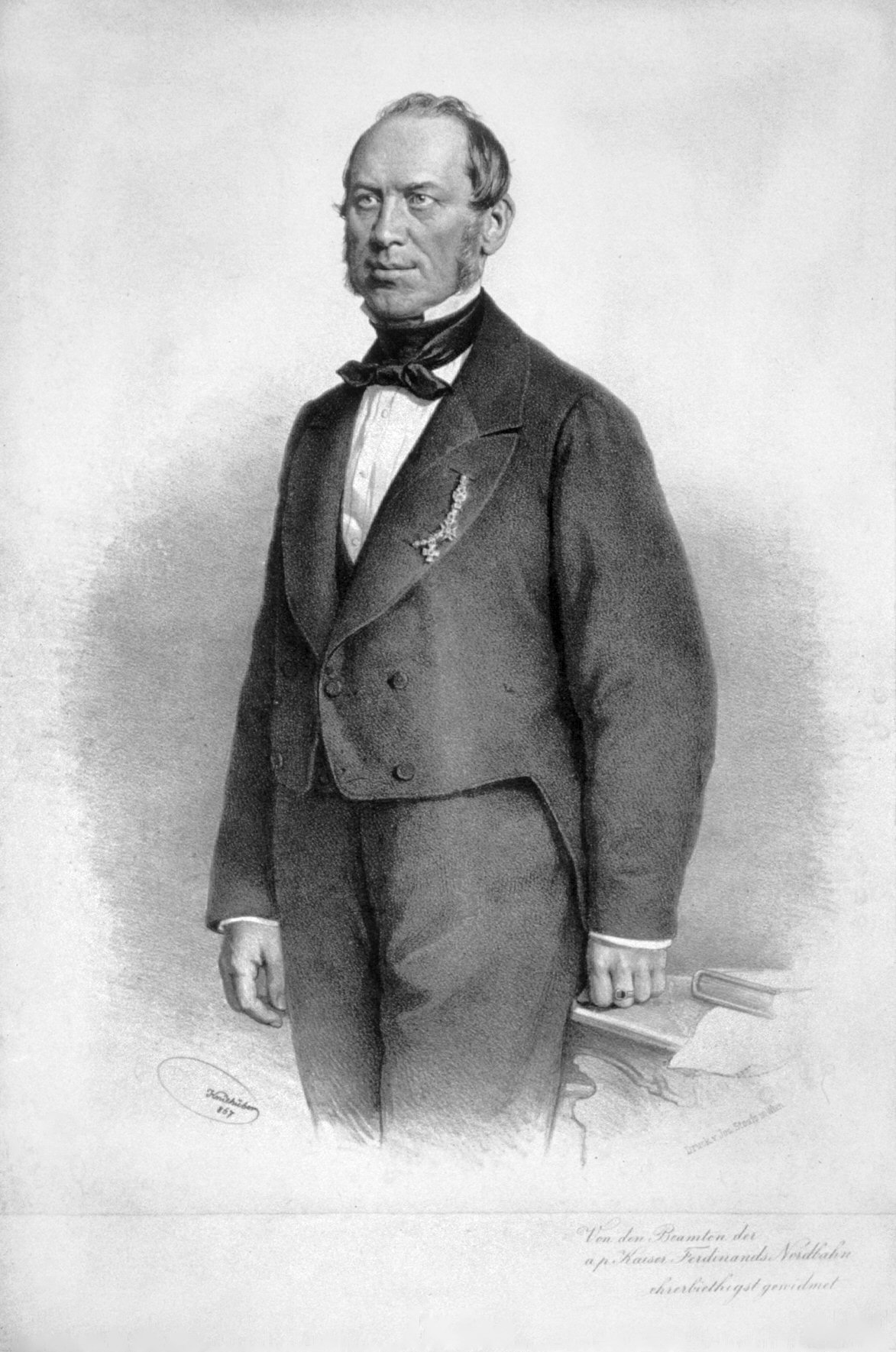 Josef Stummer Ritter von Traunfels (1808-1891), Architekt, Techniker, 1849 Präsident der Nordbahngesellschaft. Lithographie von Josef Kriehuber. 1867